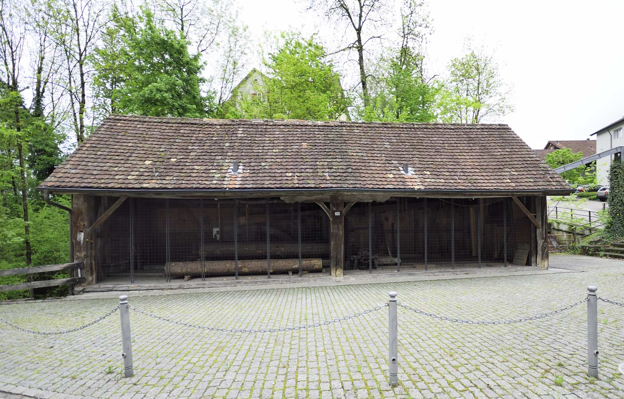 Mühle Maur, ehemalige Sägerei, ID 19500288